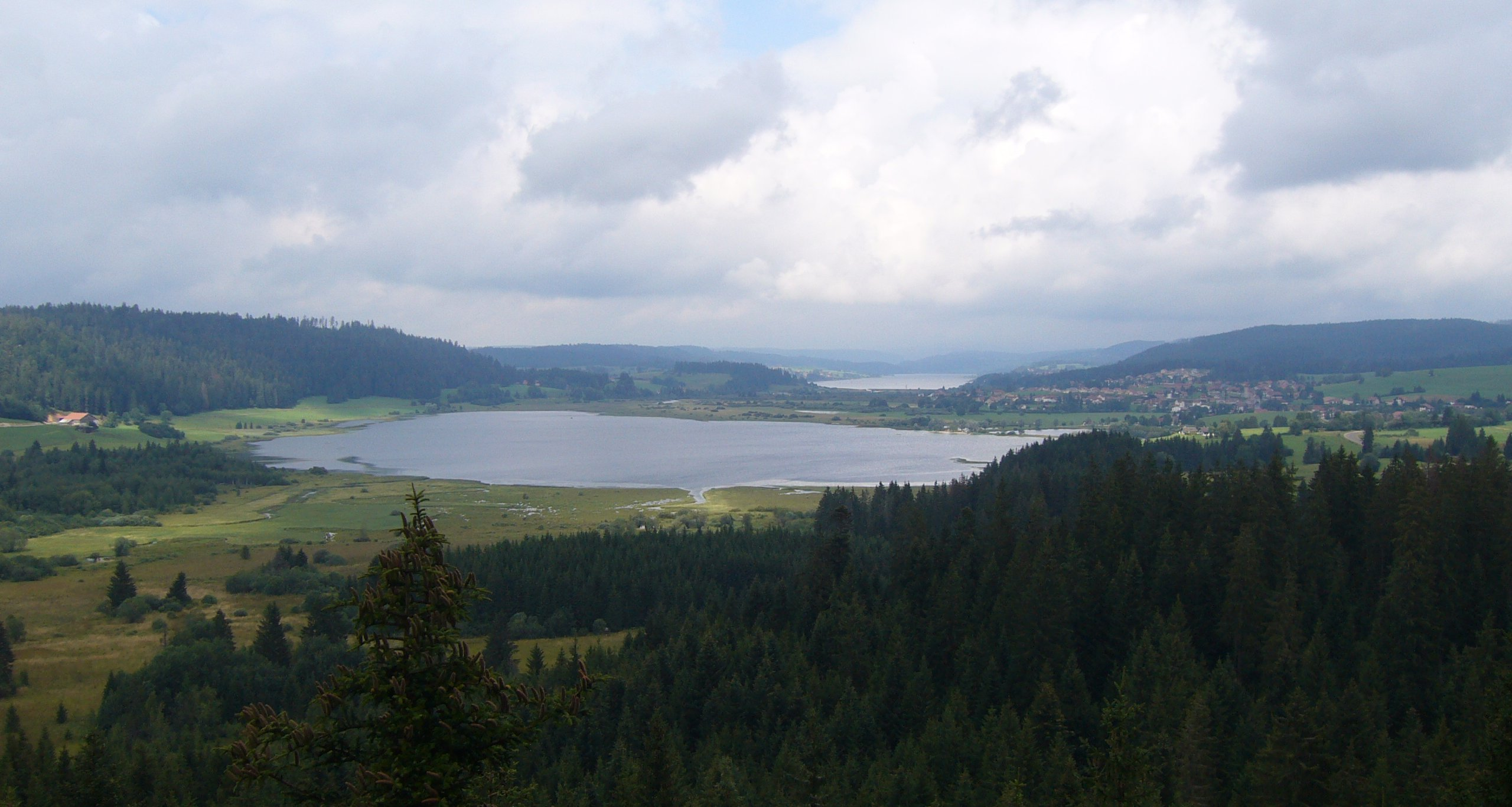 Vue de la commune de Labergement-Sainte-Marie et de la vallée des lacs Saint-Point et Remoray.